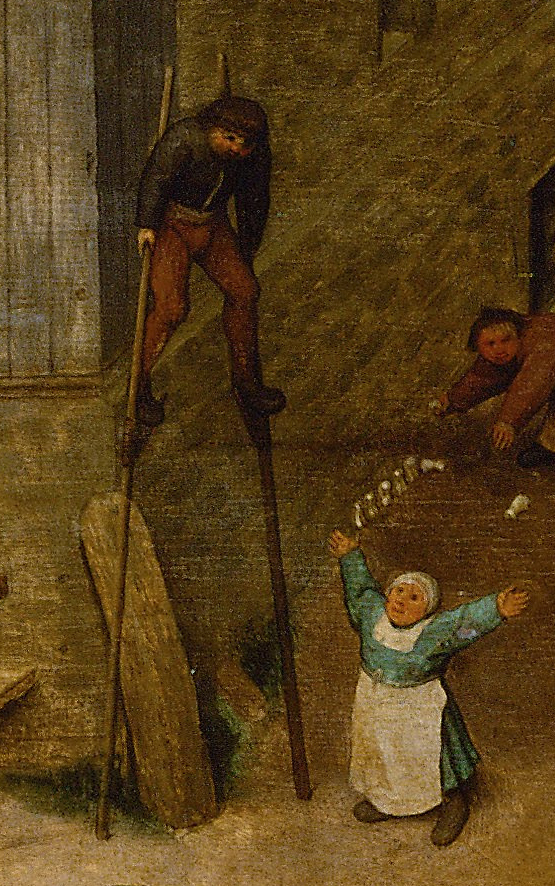 Ein Stelzenläufer. Ausschnitt aus Pieter Bruegels Gemälde Die Kinderspiele